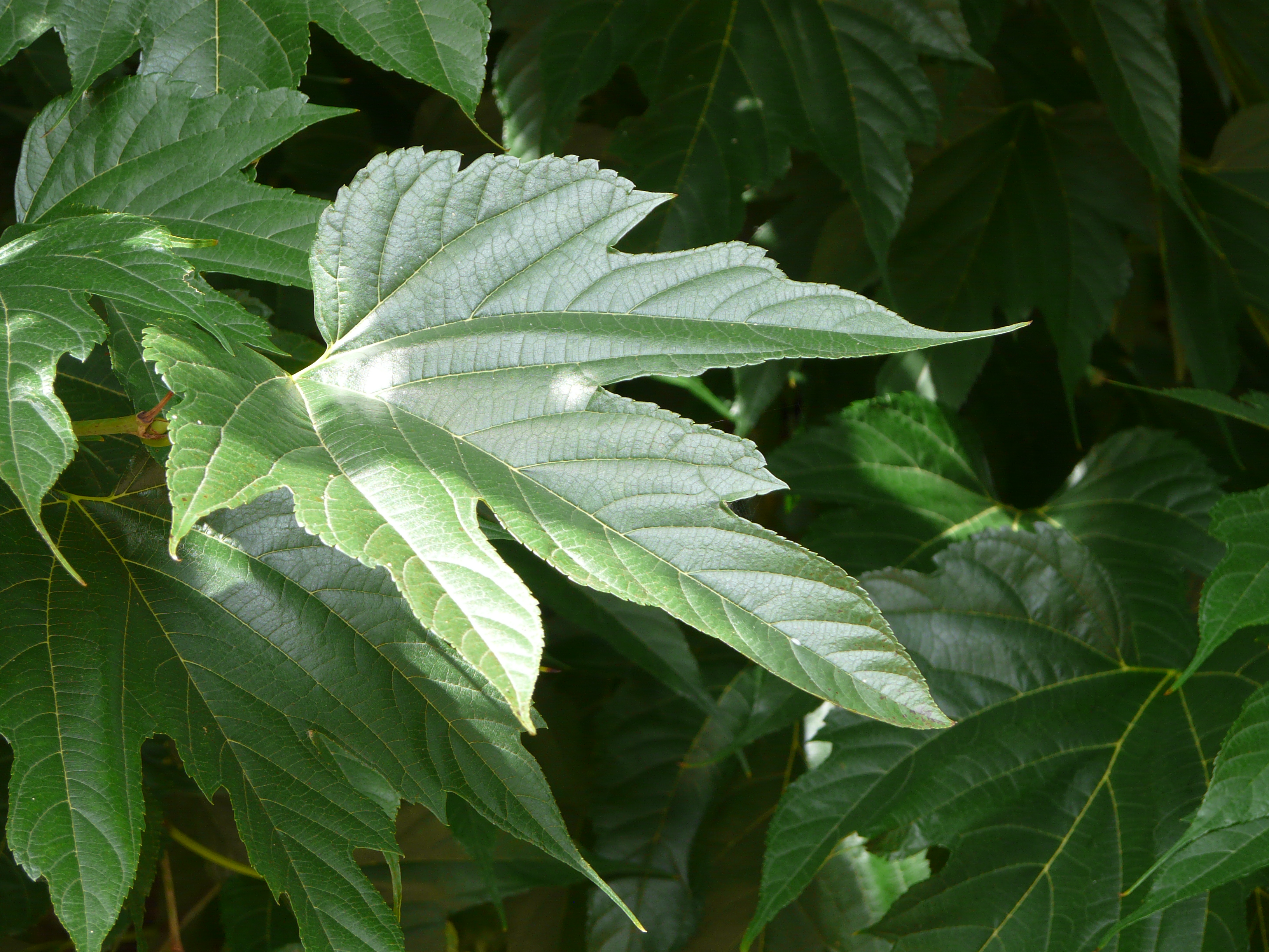 Feuille de mûrier à feuilles de platane (Morus bombycis), parc de Piquecailloux, Bergerac, Dordogne, France.